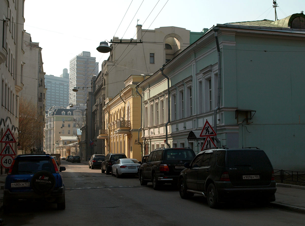 Trubnikovsky Lane, Moscow